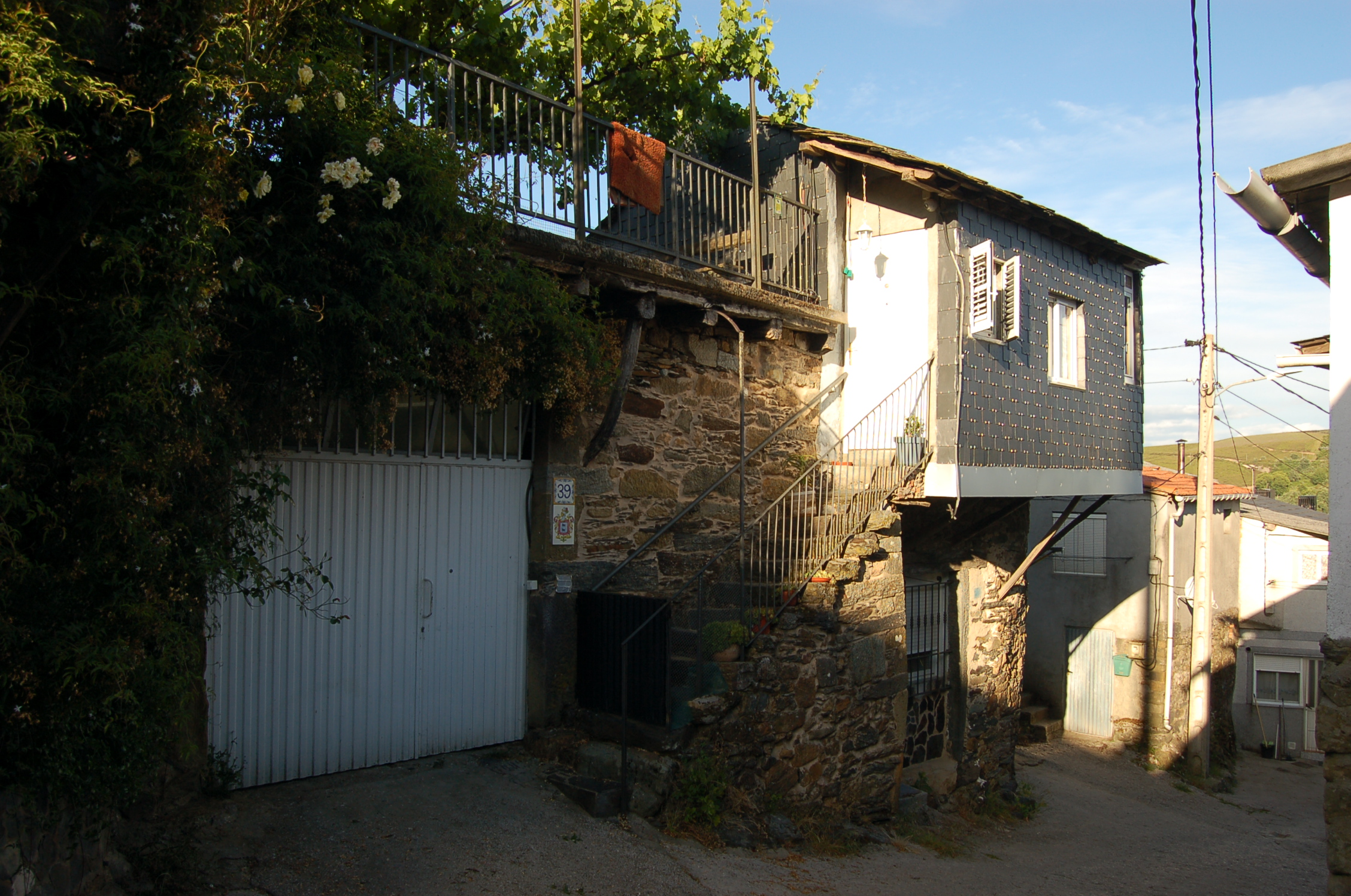 Casa de Laureano Prieto en Carracedo da Serra